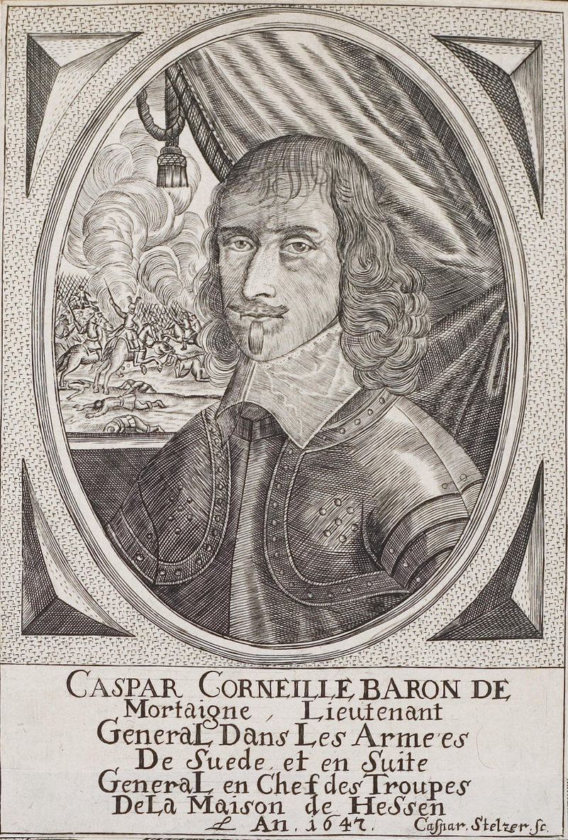 Grafik aus dem Klebeband Nr. 2 der Fürstlich Waldeckschen Hofbibliothek Arolsen Motiv: Kaspar Kornelius Mortaigne de Potelles, erscheint 1626 erstmals in schwedischen Diensten; wurde dort 1637 Oberst und 1641 Generalmajor; 1646/47 wechselte er als Generalleutnant in die Dienste Hessen-Kassels